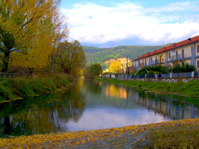 Parco delle sorgenti del Rio Grassano, San Salvatore Telesino (BN)